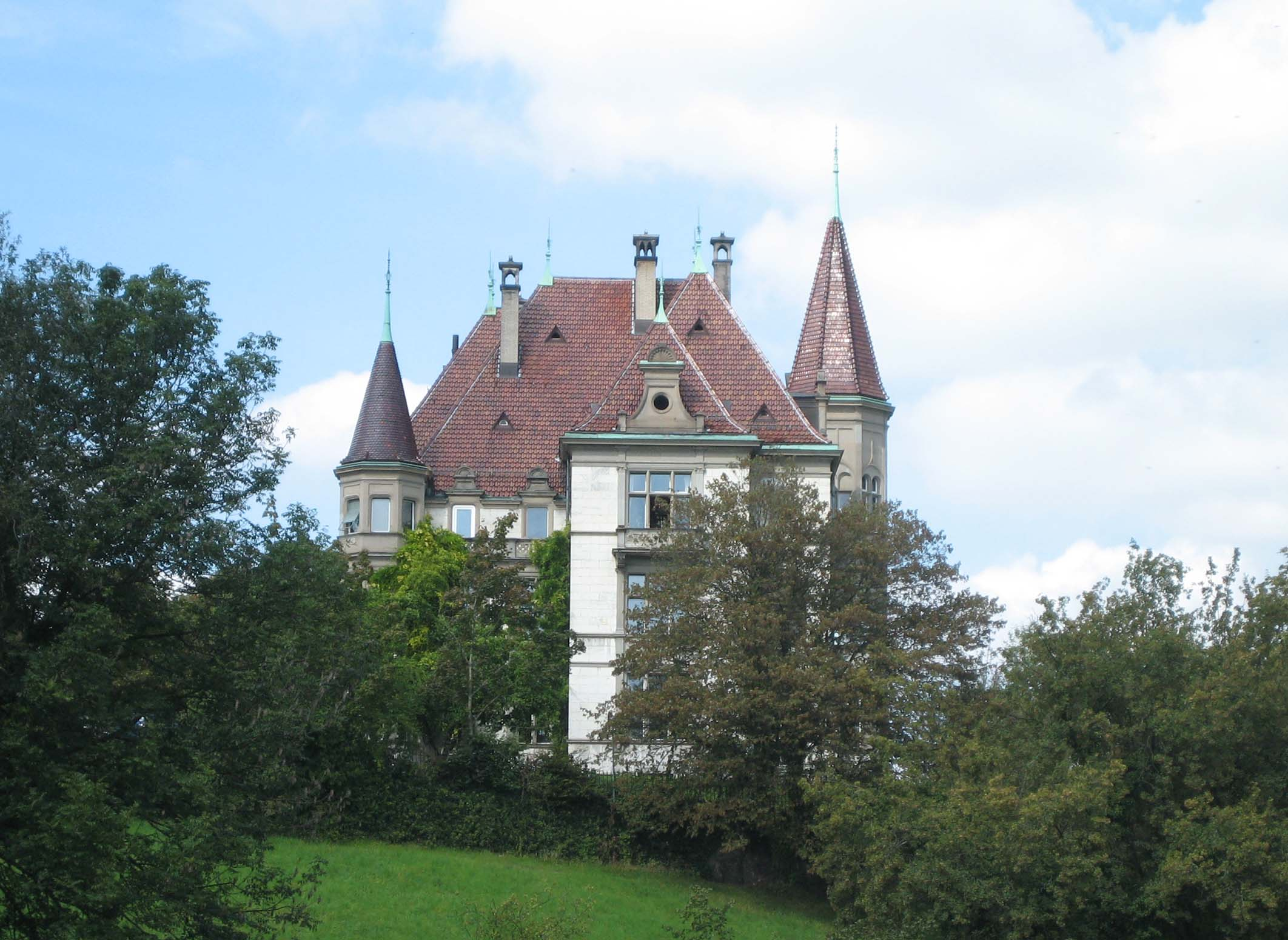 Villa Sihlberg: Südseite